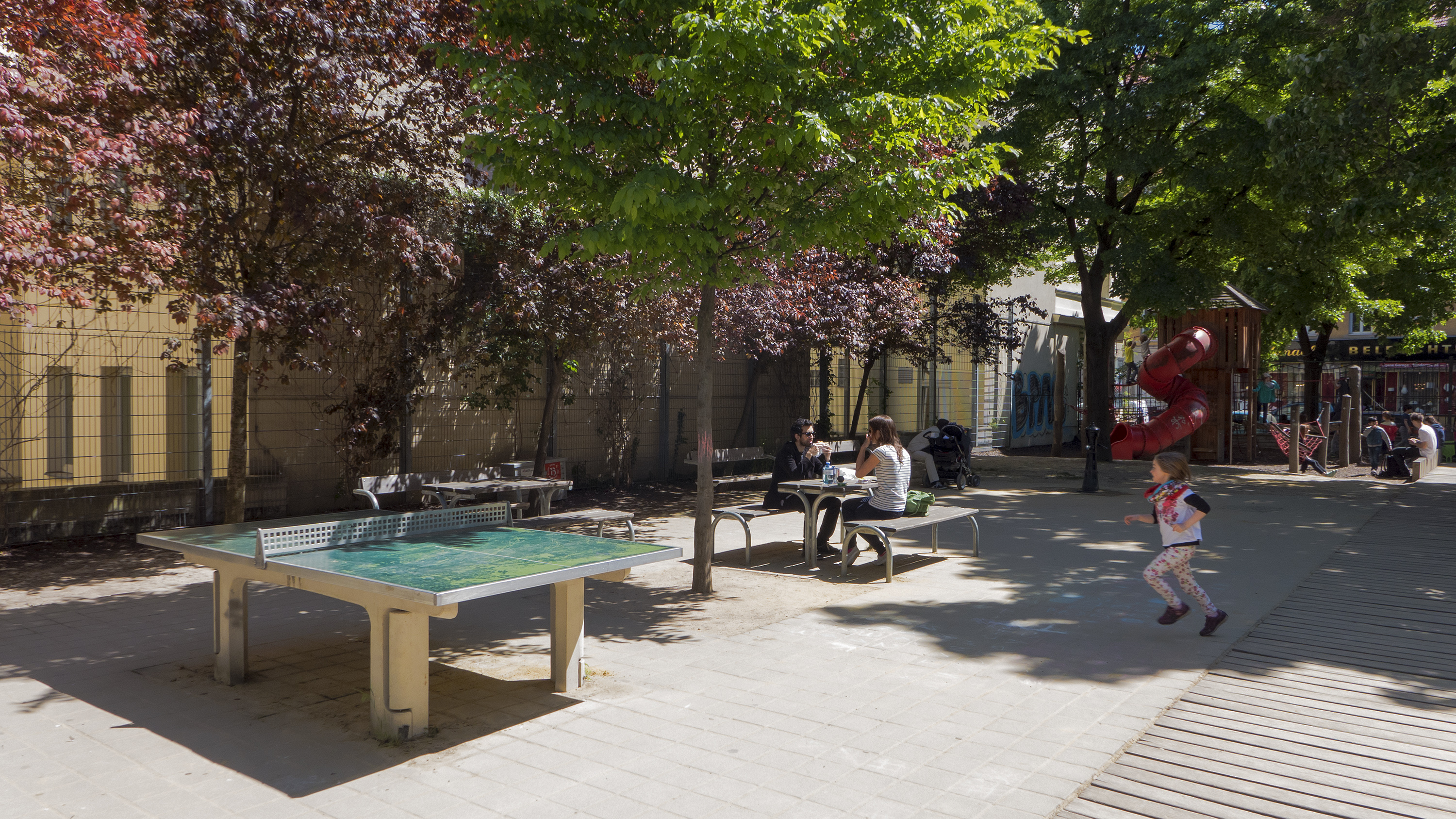 Karl-Farkas-Park in Wien 7